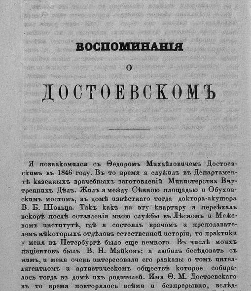 Воспоминания врача Степана Дмитриевича Яновского о Достоевском. Журнал "Русский вестник", 1885, № 176, стр. 786